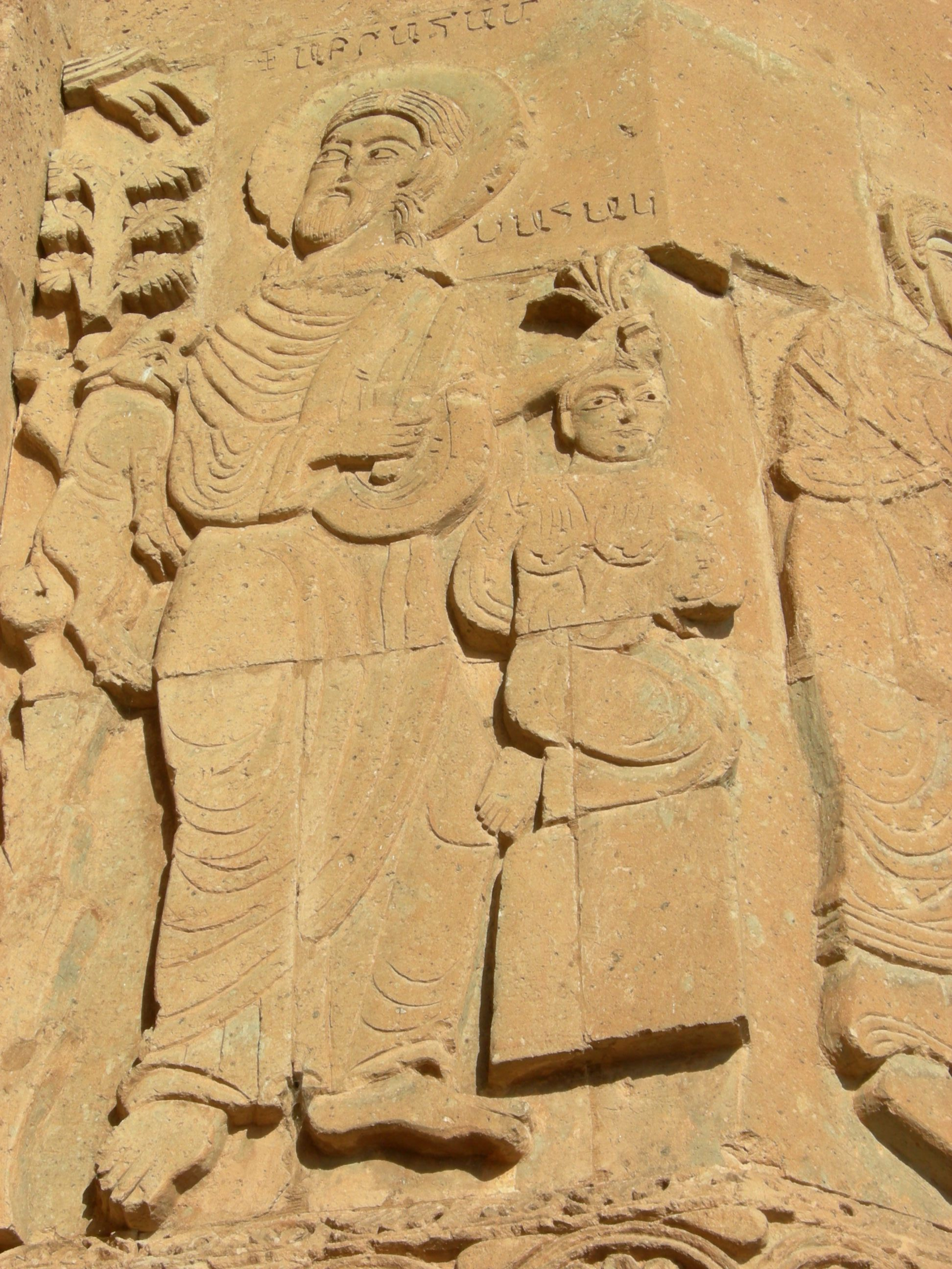 Wandrelief Akdamar Abraham und Isaak